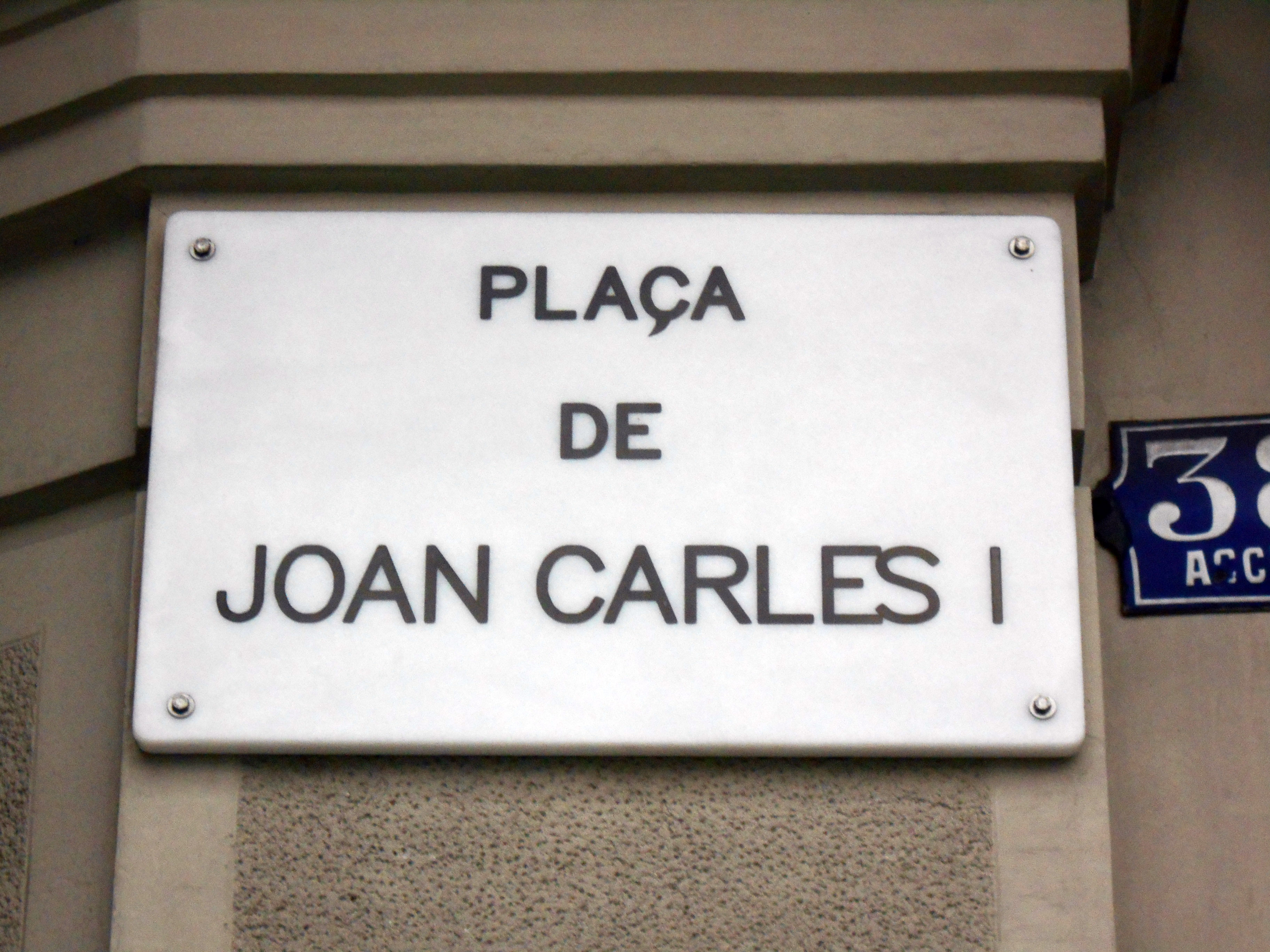 Plaza de Juan Carlos I.